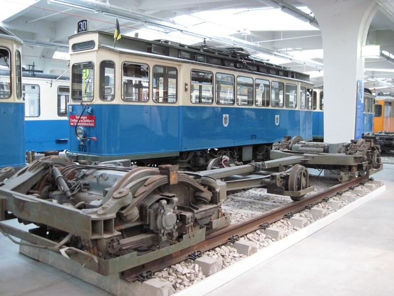 Lenkdreiachser-Fahrgestell eines Triebwagens der Münchener Baureihe M im MVG-Museum München. Im Hintergrund der Maximum-Wagen 670 der Baureihe K.